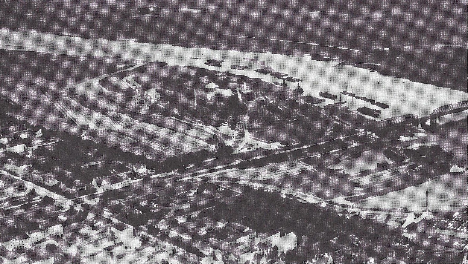 Luftbild des Zellstoff-Fabrik Waldhof an der Memel in Tilsit